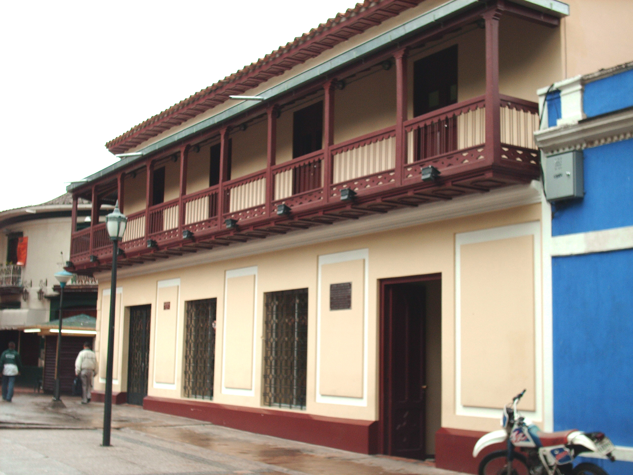 Casa patrimonial estilo altillo alemán construida entre 1884 y 1888 en San Cristóbal, Edo. Táchira, Venezuela